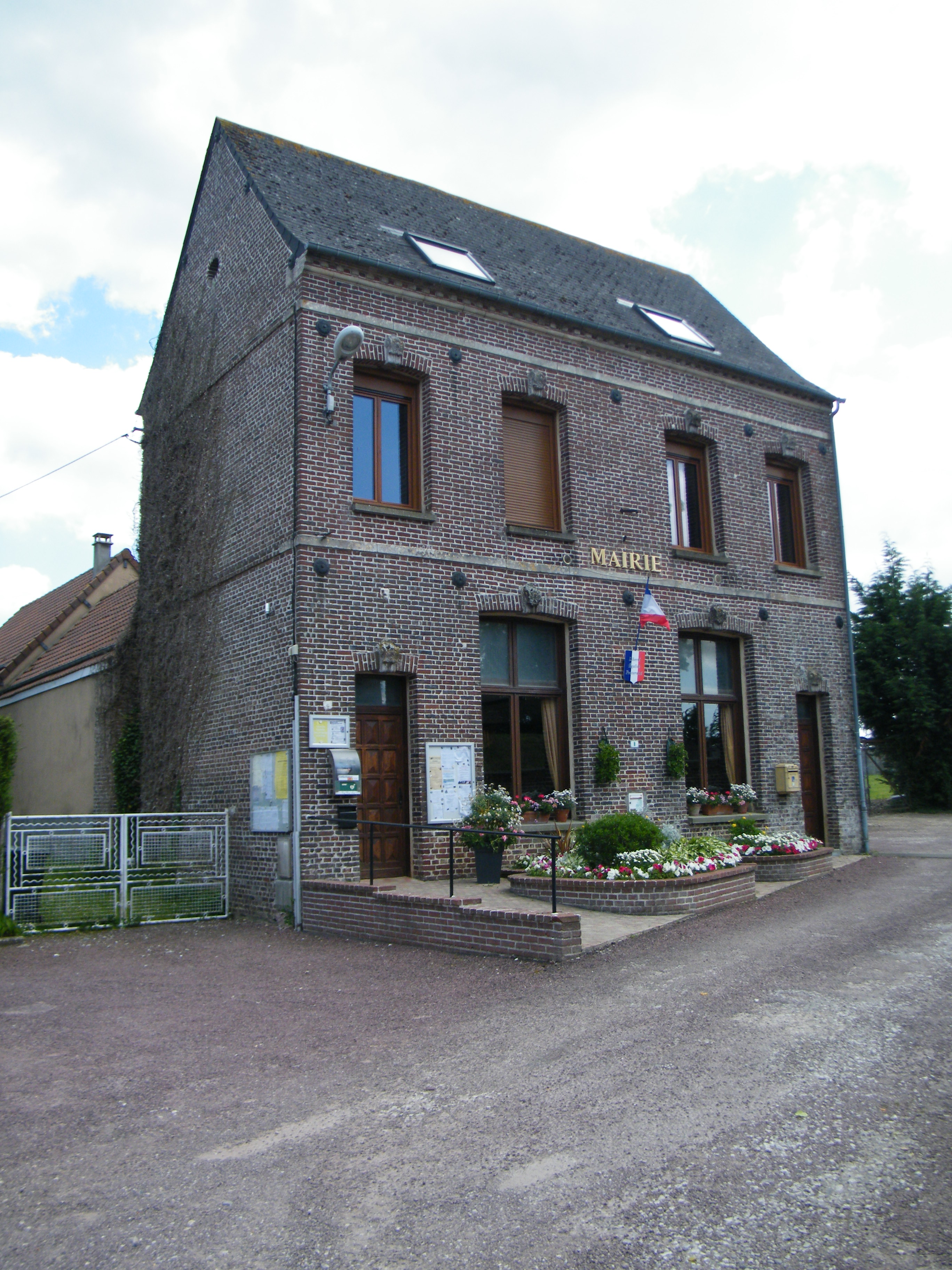 Mairie.